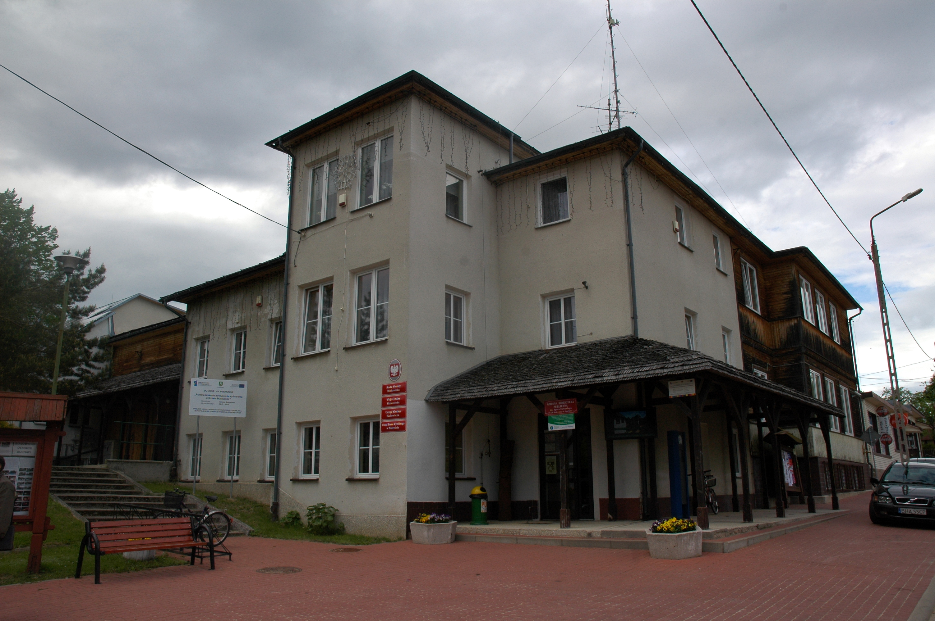 Białowieża - urząd gminy